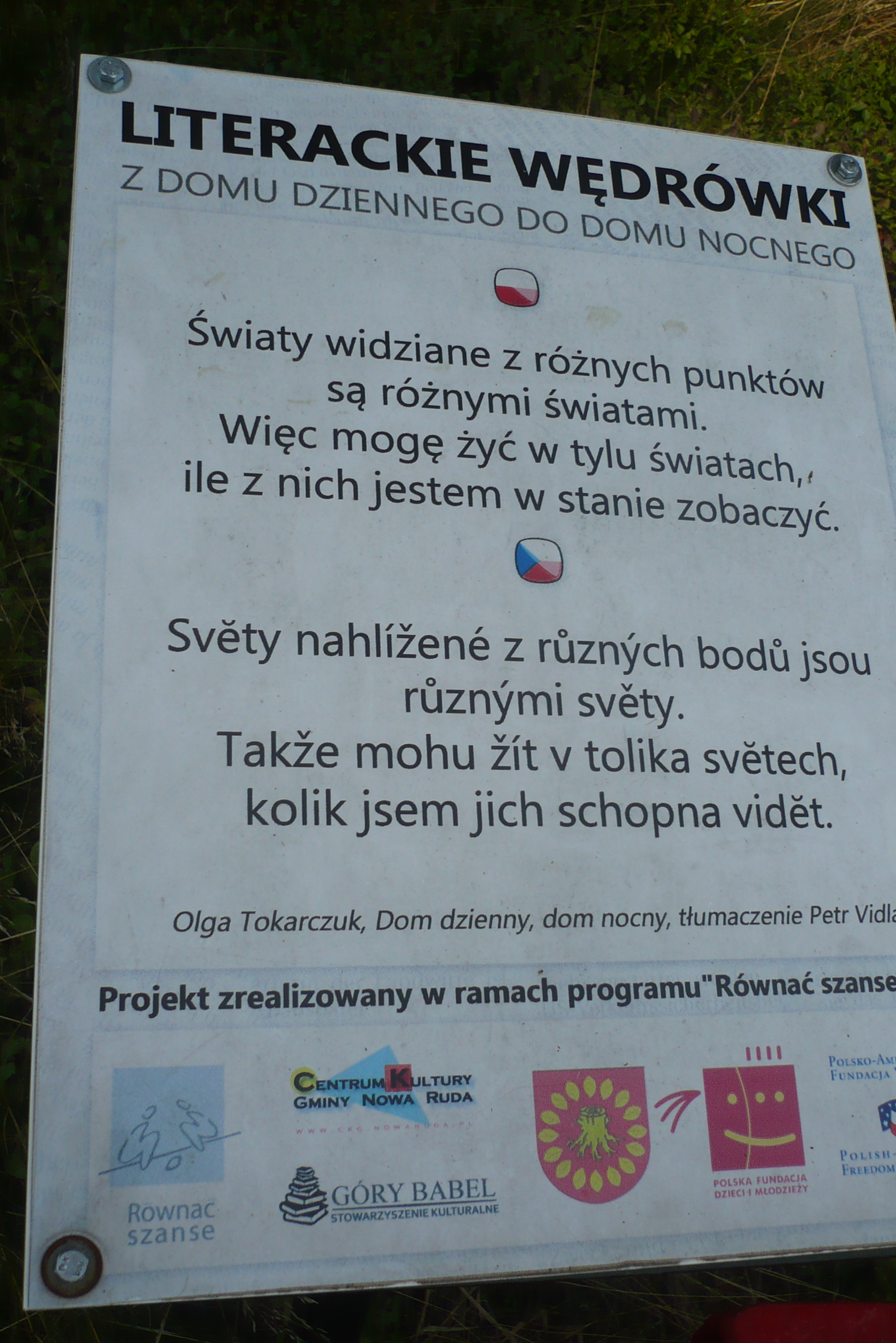 Bartnica. Literackie Wędrówka